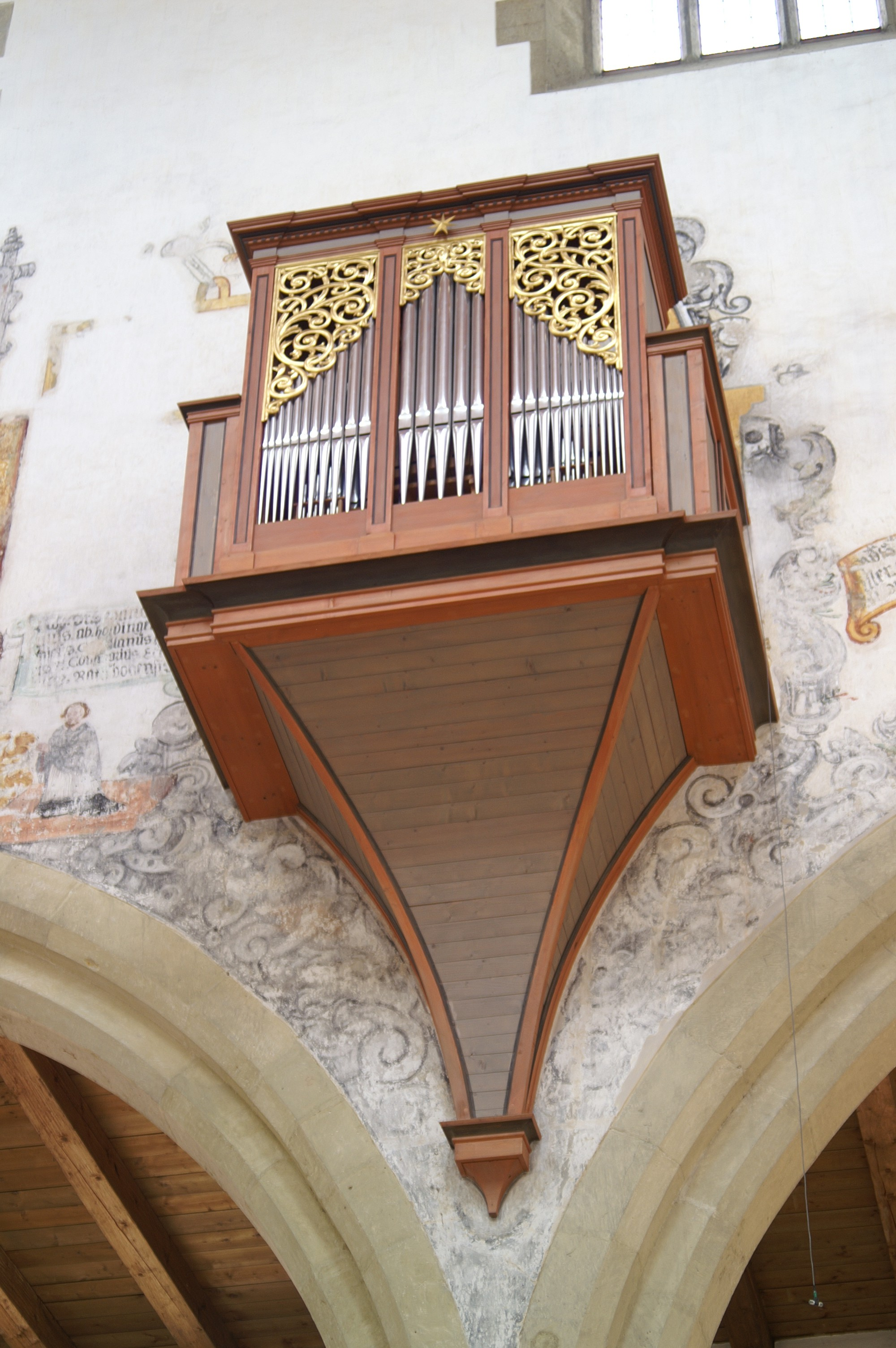 Schwalbennestorgel der Minoritenkirche in Regensburg